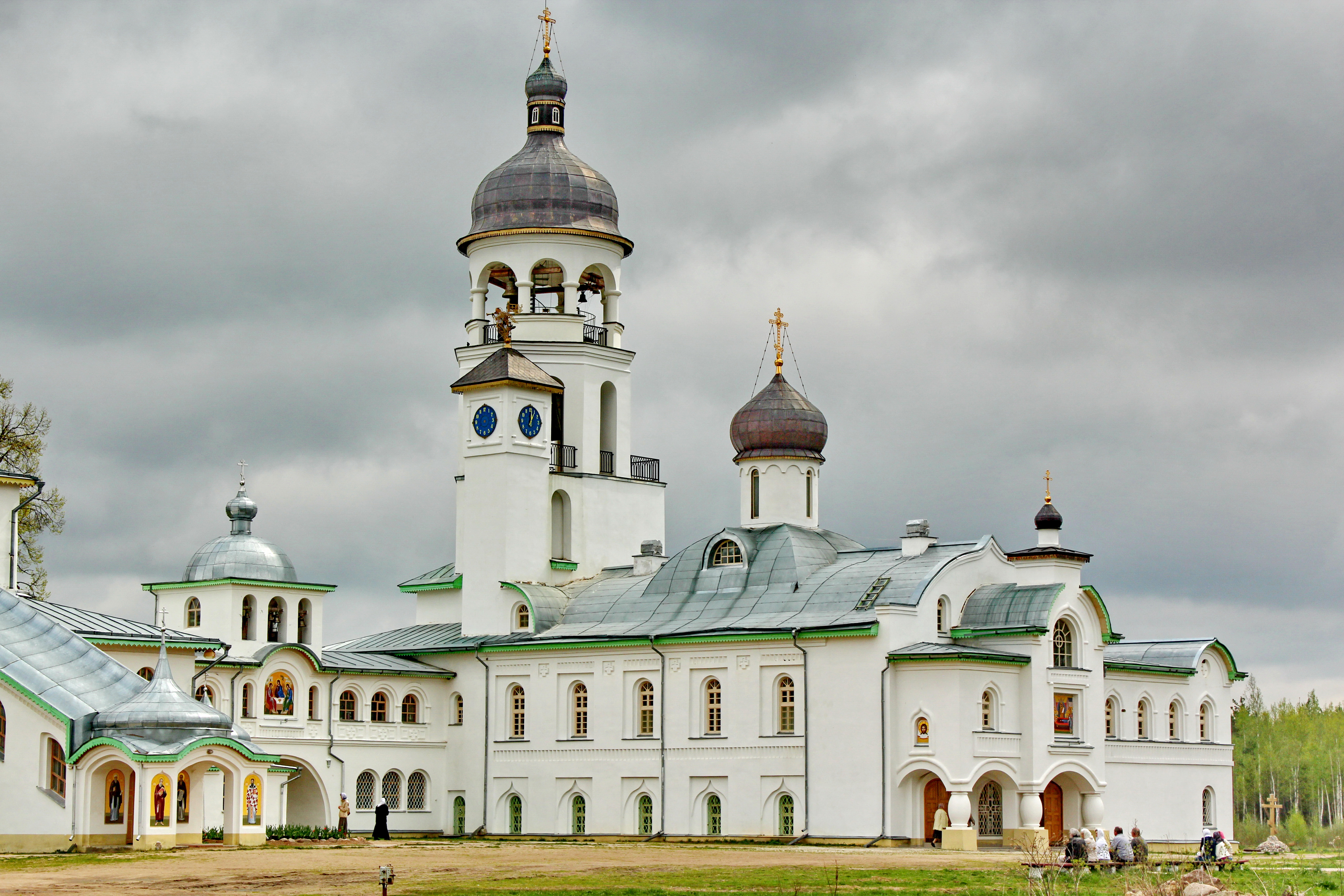 галерея и колокольня (трапезная с церковью Успения Пресвятой Богородицы и колокольней): Крипецкое, Псковский район, Псковская область